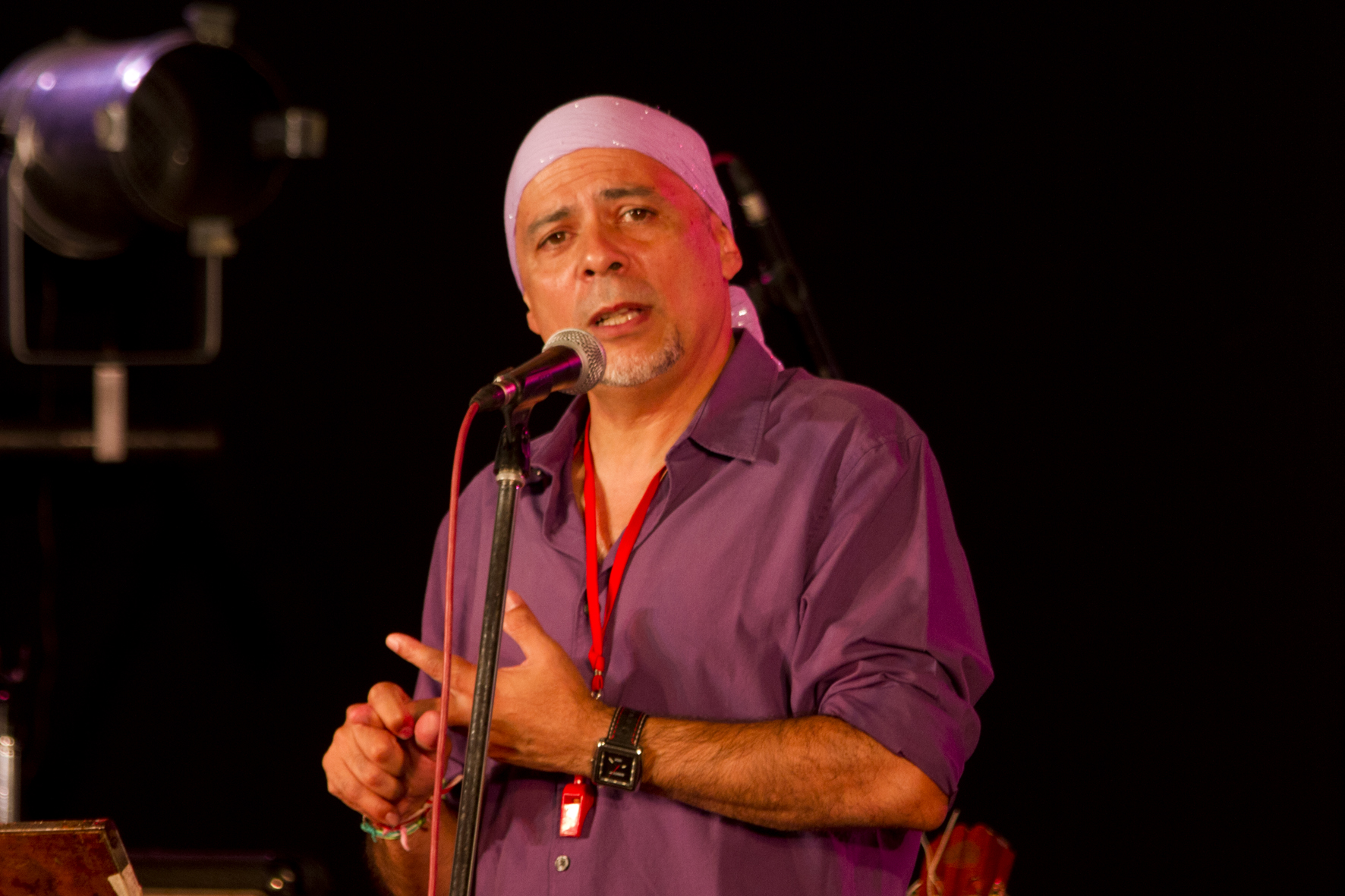 Ariel Prat - Homenaje a Juan Carlos Cáceres en Radio Nacional